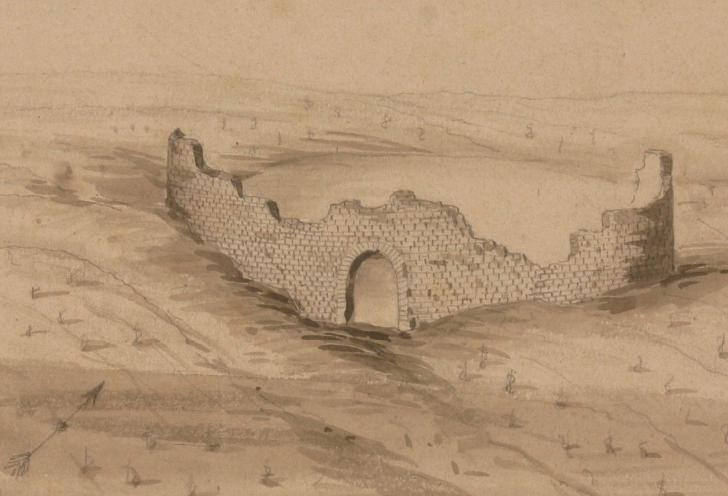 Les arènes du Mans selon un dessin effectué par l'artiste-architecte Louis Maulny, au XIXème siècle.